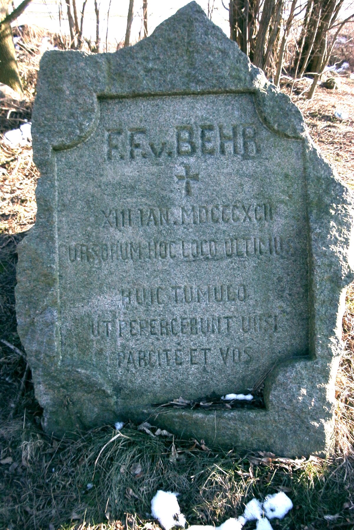 Gedenkstein des letzten Behr in Vagatz